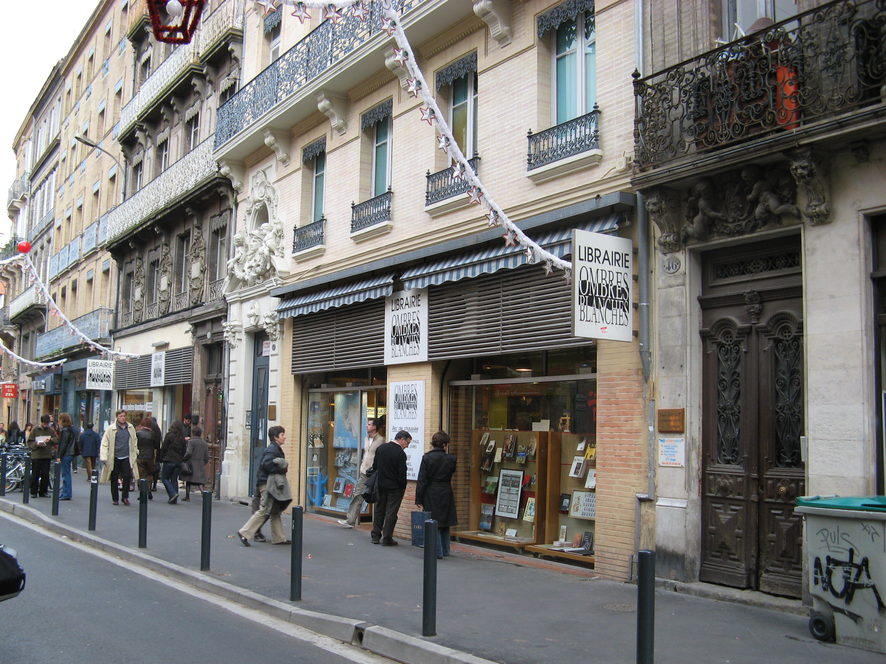 Libraire Ombres Blanches, rue Léon Gambetta à Toulouse.